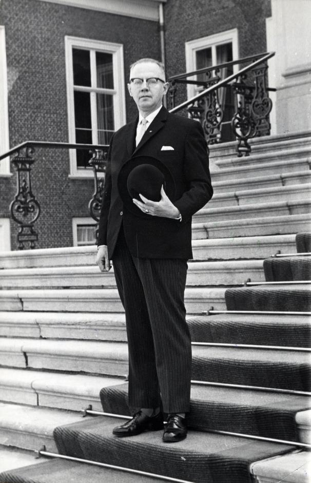 Jongeling , P. (GPV). Voorzitter Piet Jongeling van het GPV, ontvangen door de koningin op paleis Huis ten Bosch als één van de adviseurs van de kleinere partijen voor de kabinetsformatie. Nederland, Den Haag, 18 mei 1963.